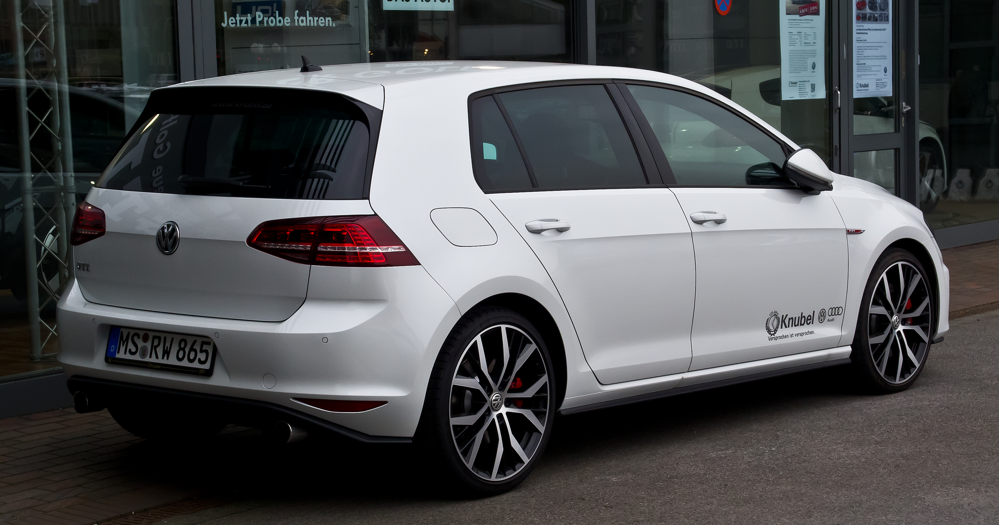 VW Golf GTI (VII)